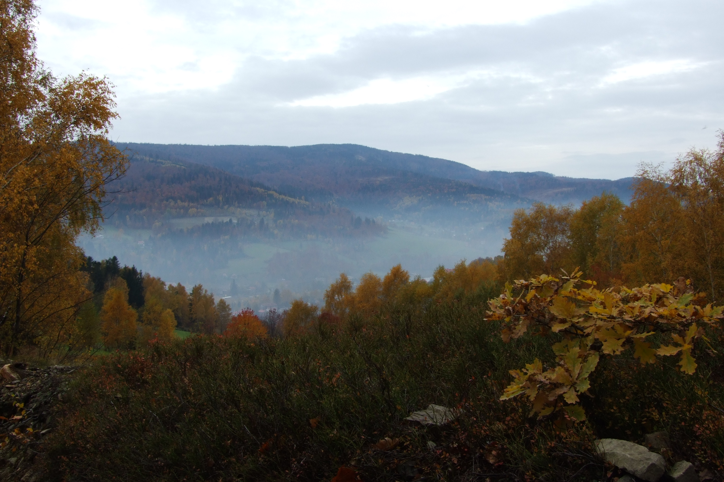 Szlak zielony na Błatnią